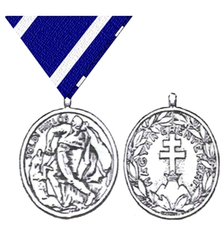 Grafische Darstellung der Nikolaus-Toldi-Medaille mit Ergänzung des Ordensbandes